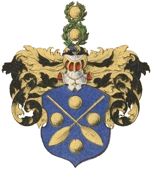 Rüdingeri suguvõsa aadlivapp